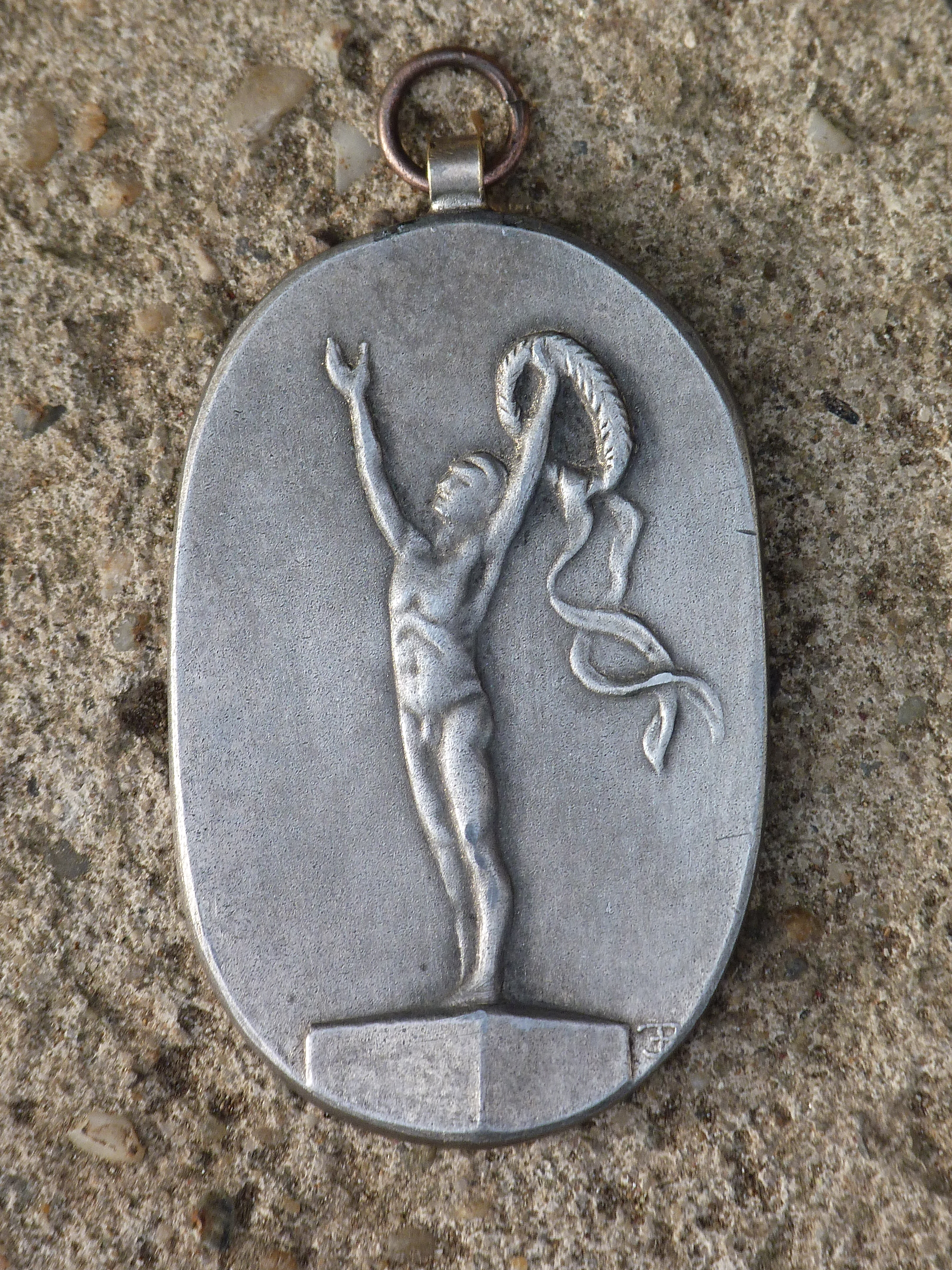 A felvétel 2012. november 11 -én készült. Fém emlékérem,4,8 cm x 3,1 cm. Spartakusz kézilabda emléktorna 1957 I.